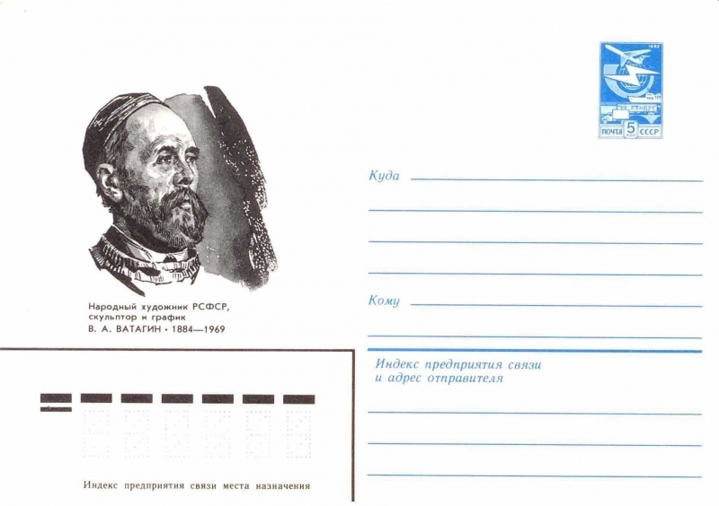 Художественные маркированные конверты 1983 года.